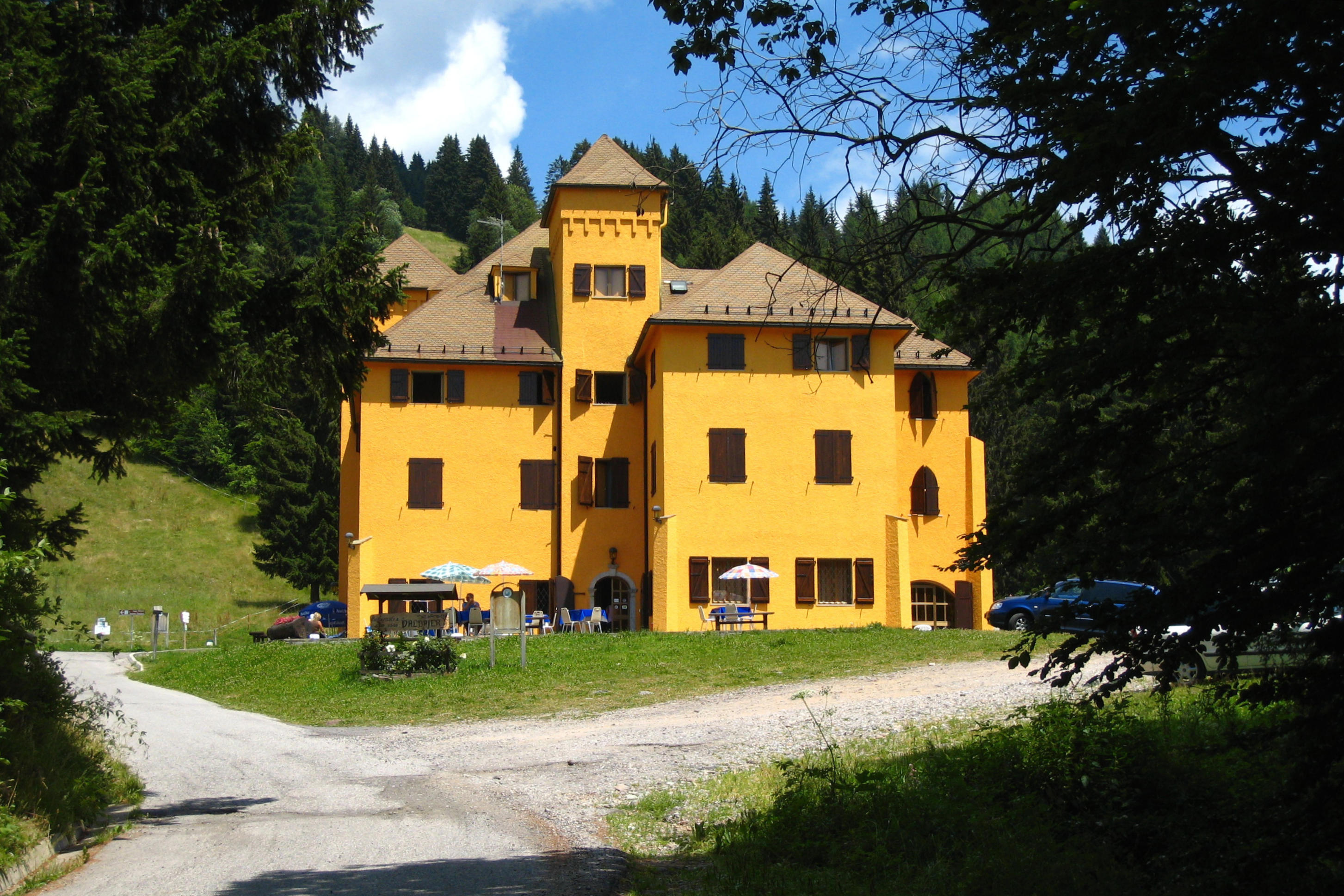 Castel Valdajer, (UD). Luglio 2007